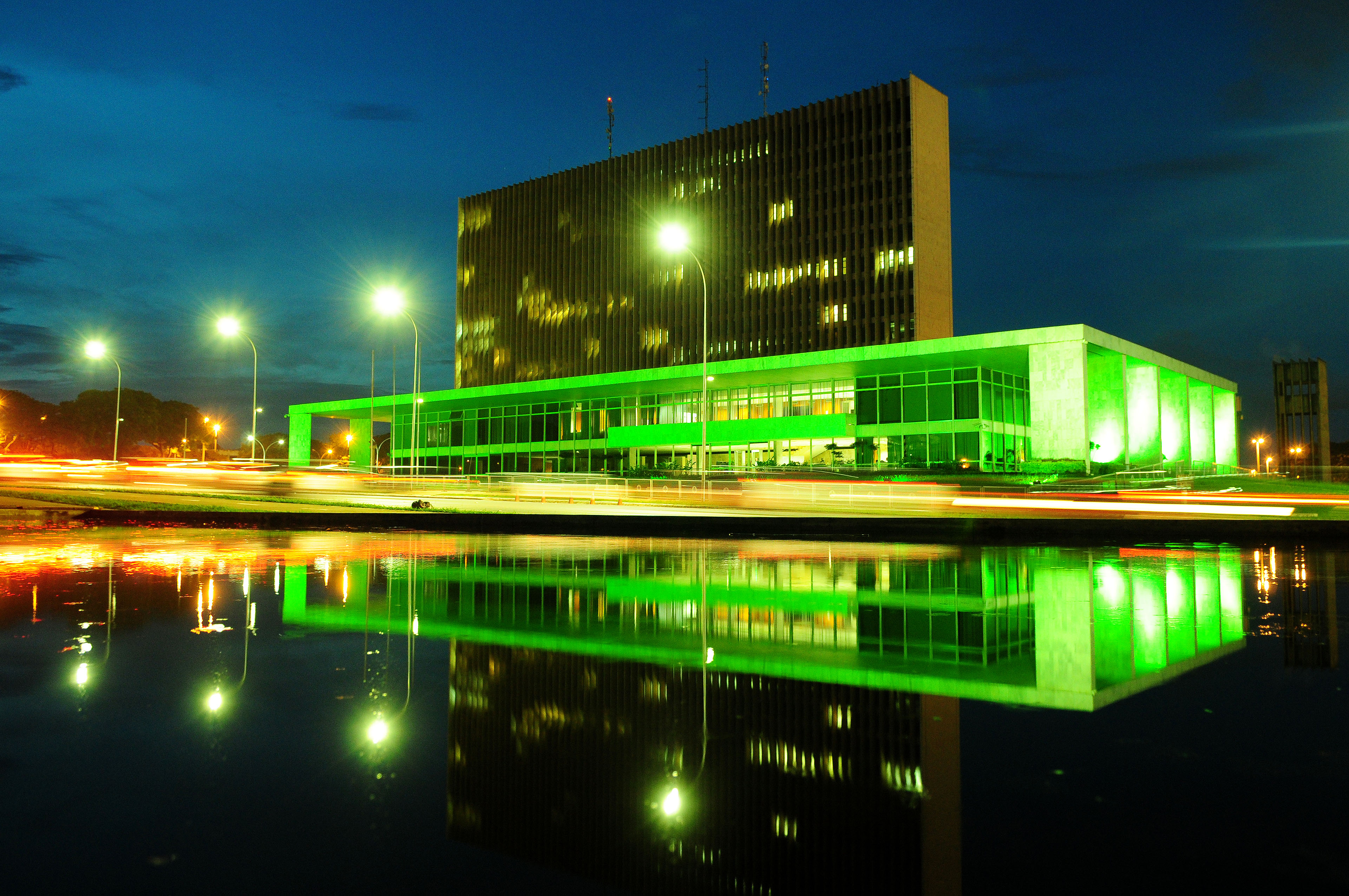 Palácio do Buriti, Plano Piloto, Brasília, DF, Brasil 2/12/2016 Foto: Pedro Ventura/Agência Brasília O Palácio do Buriti ficará iluminado de verde até domingo (4 de dezembro de 2016). O gesto é uma homenagem às vítimas do acidente aéreo com o time de futebol Chapecoense, que ocorreu na terça-feira (29 de novembro de 2016), nas proximidades de Medellín, na Colômbia.